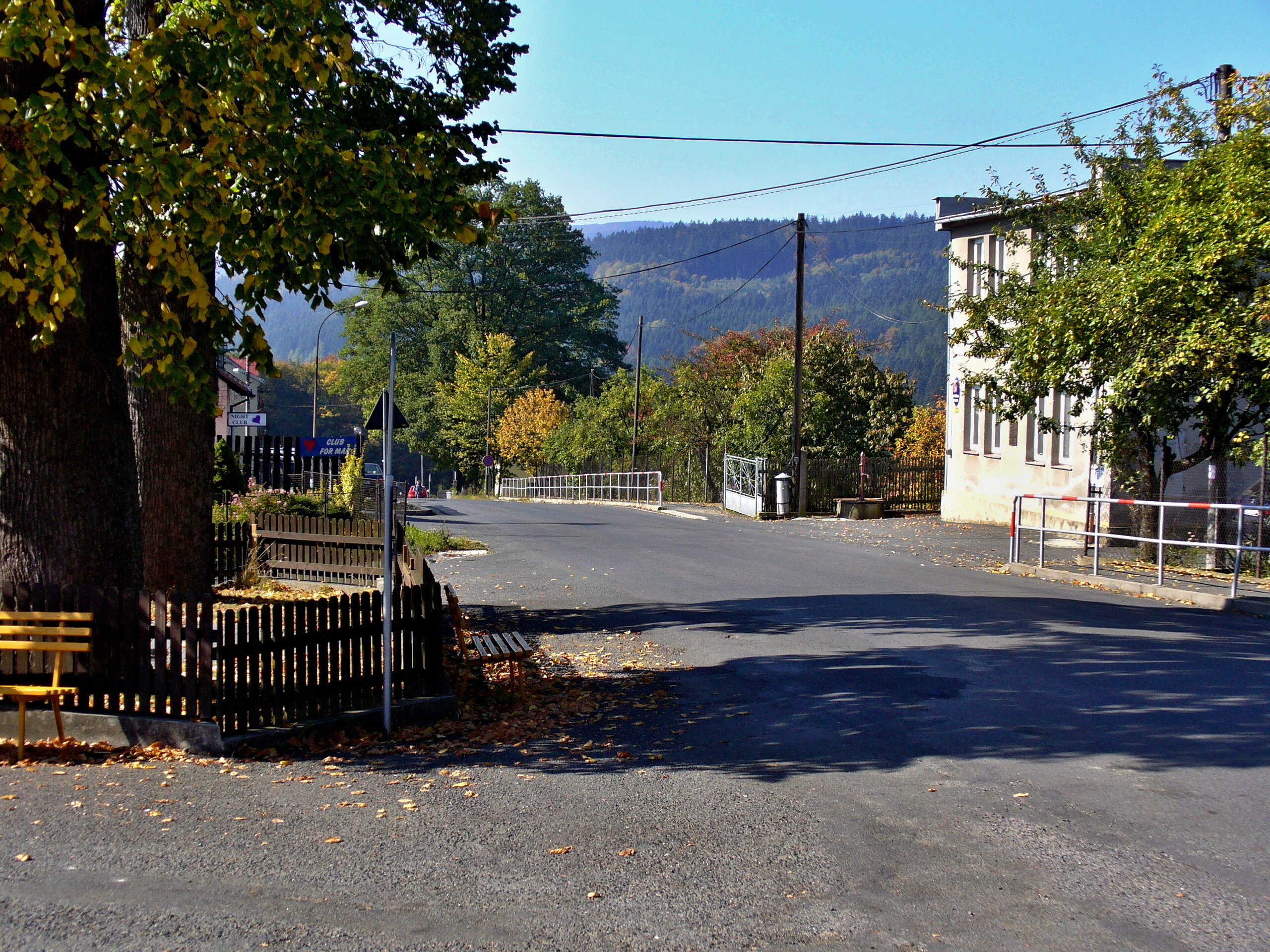 Česká Kubice -Obecní úřad